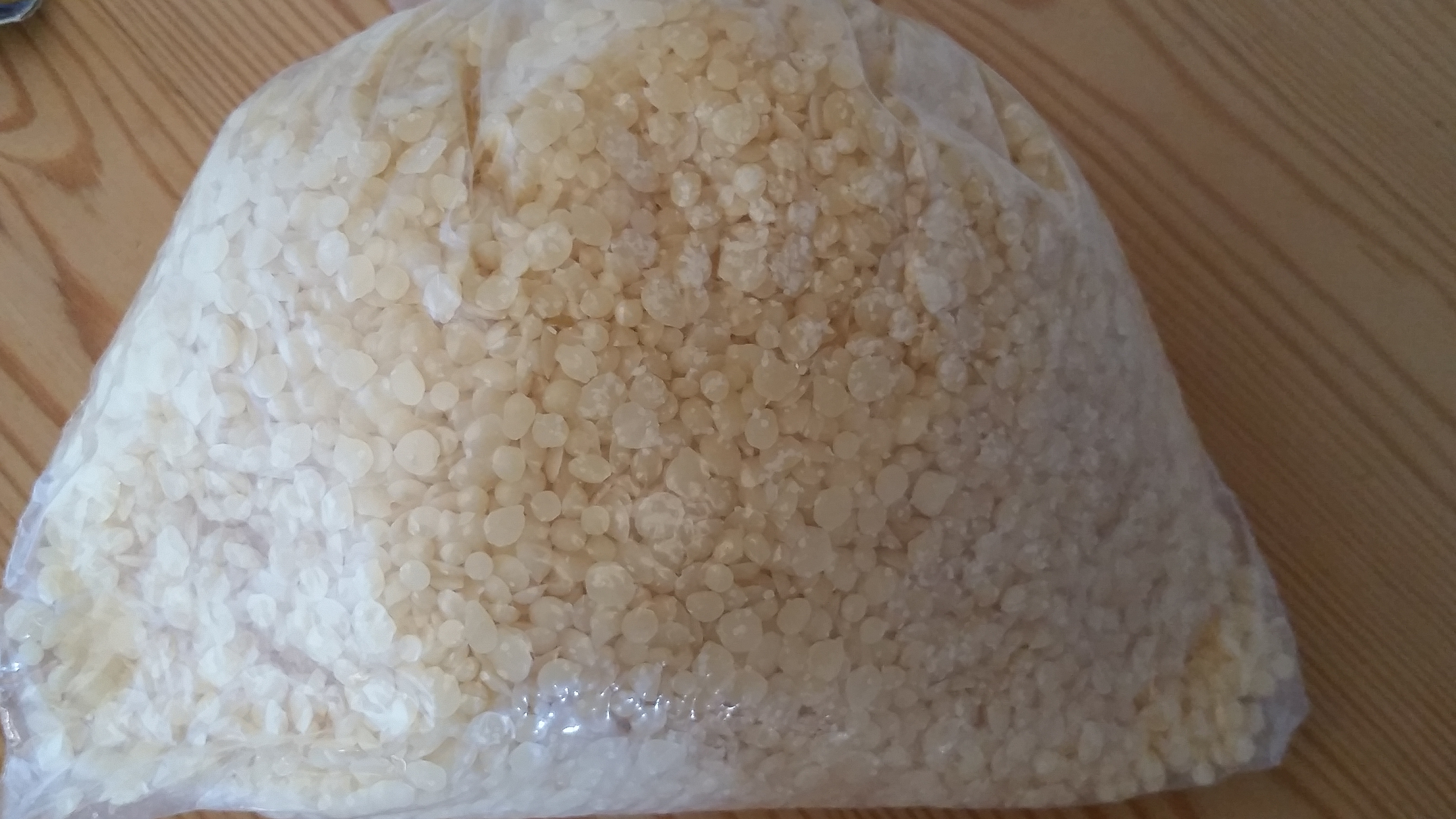 שעוות גבינות גרגירית בטרם המסה